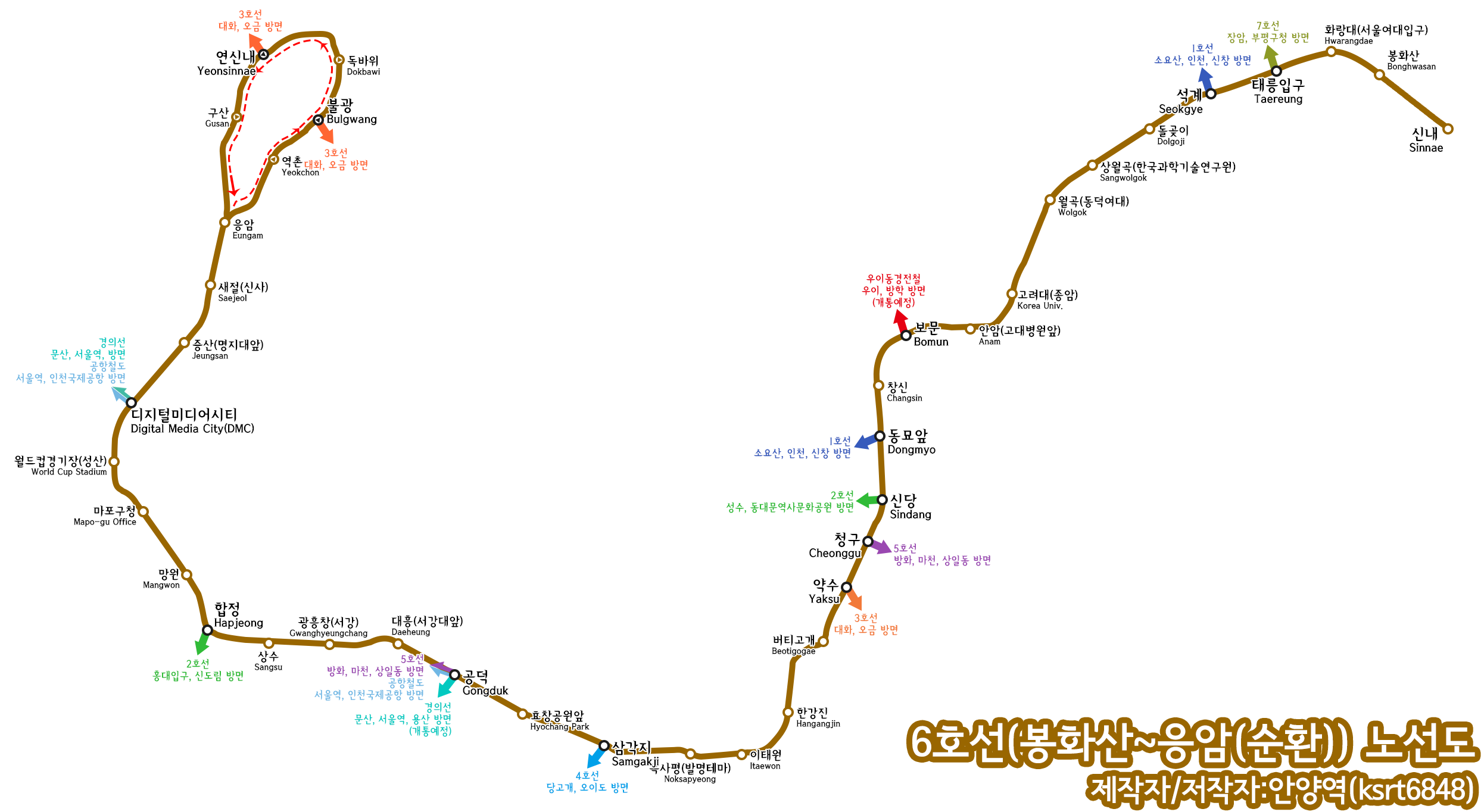 본 노선도를 배포하실 경우에는 되도록 저작자를 기재해 주시기 바랍니다. 본 노선도에 나온 미개통/계획 표시등은 새로 정보가 나오는대로 업데이트를 실시 할 것입니다. 본 노선도의 저작권은 안양역(ksrt6848)에게 있으며, 자유적으로 배포하실 수있는 사진입니다.